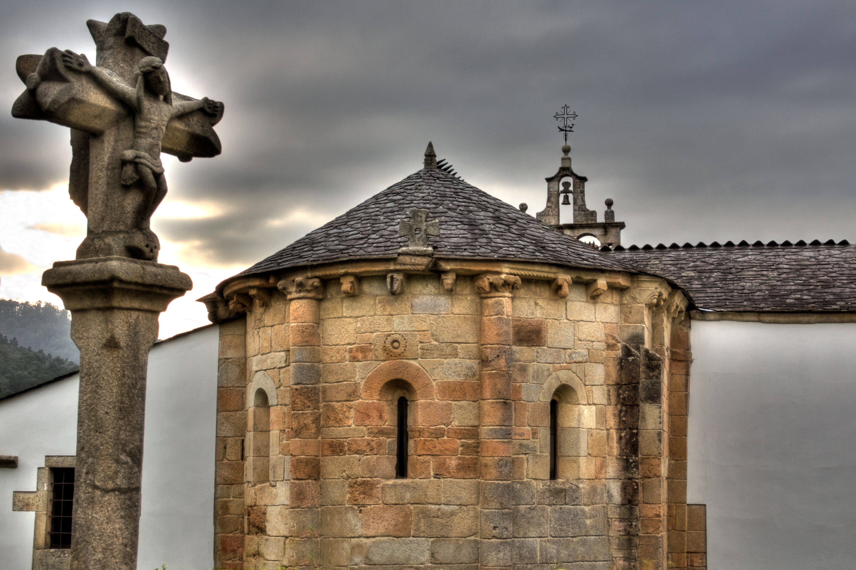 Viveiro, Iglesia de San Pedro